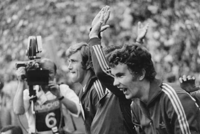 ADN-ZB-Mittelstädt-16.7.74-wen-München: X. Fußball-Weltmeisterschaft- Spiel um den dritten Platz VR Polen gegen Brasilien 1:0 am 6.7.74. Freude auf der polnischen Spielerbank über das 1:0 durch Grzegorz Lato.